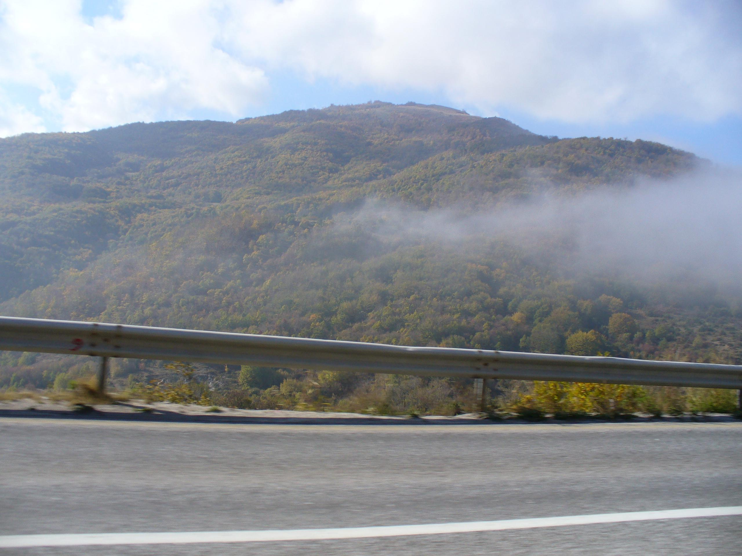 Плетвар и околината во магла. Некаде помеѓу 10 и 10и30 часот наутро.